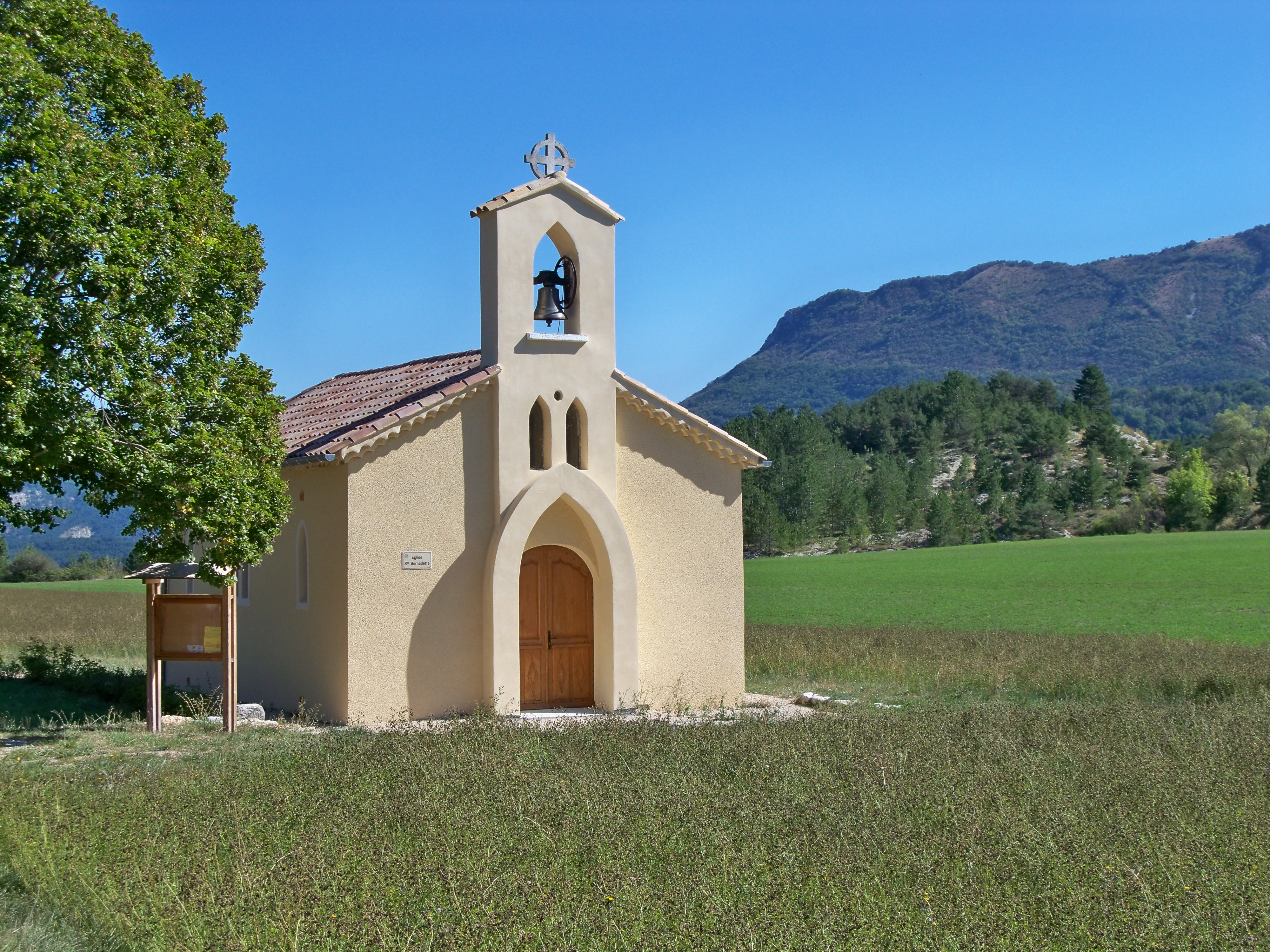 église Sainte Bernadette à Villefranche le Chateau